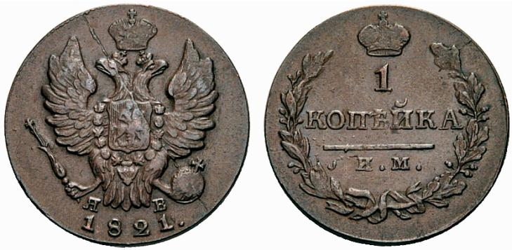 Münze: Eine Kopeke, Kupfer, Russland, Zar Alexander I.